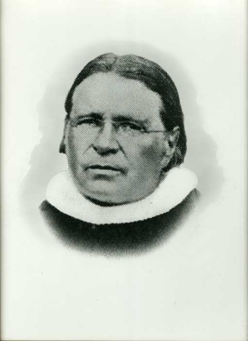 Ordfører i Ørland og Bjugn Rasmus Brochmann Parelius Gaarder